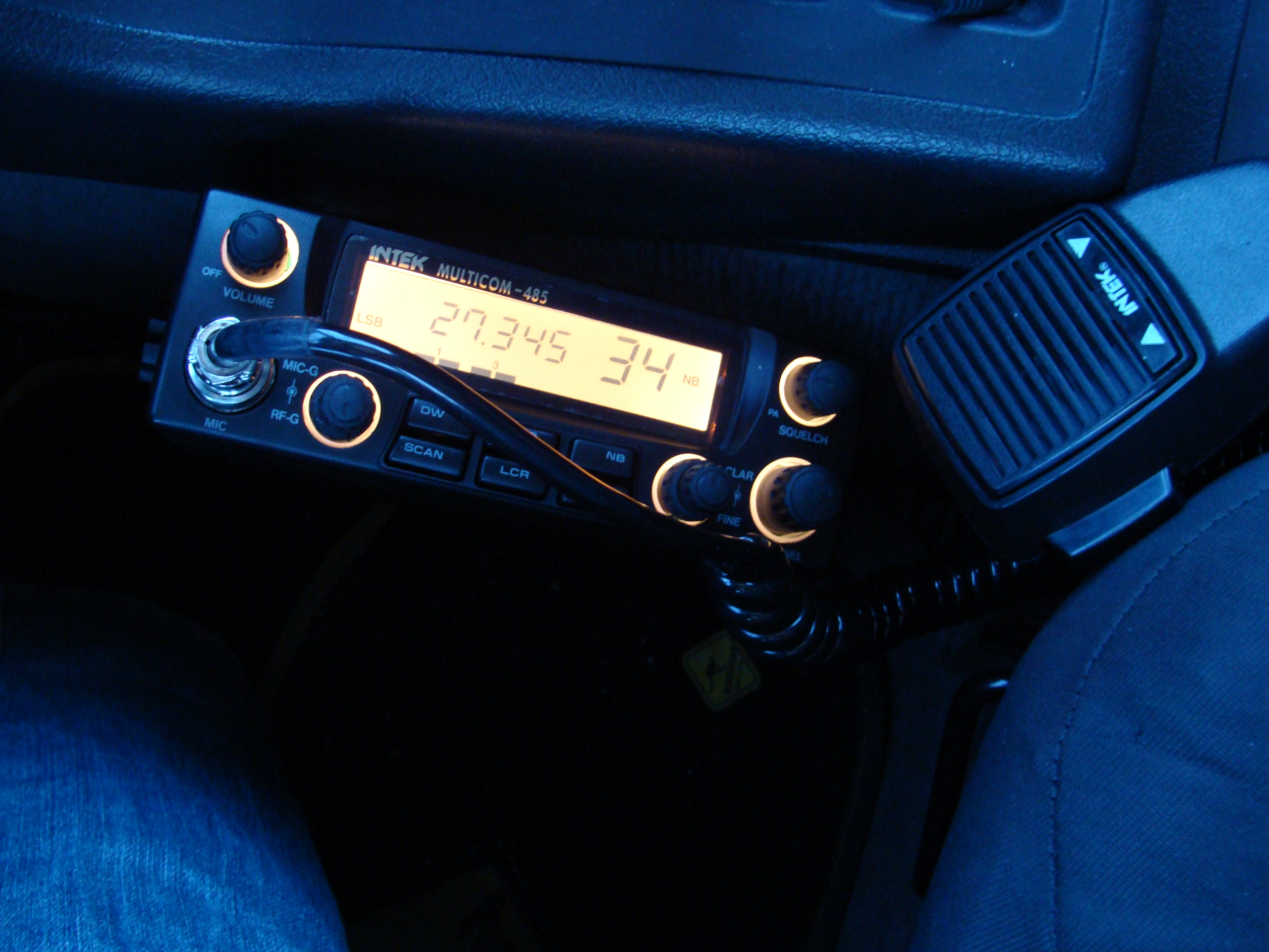 CB radio transceiver Figueira da Foz, Portugal, 04/2010